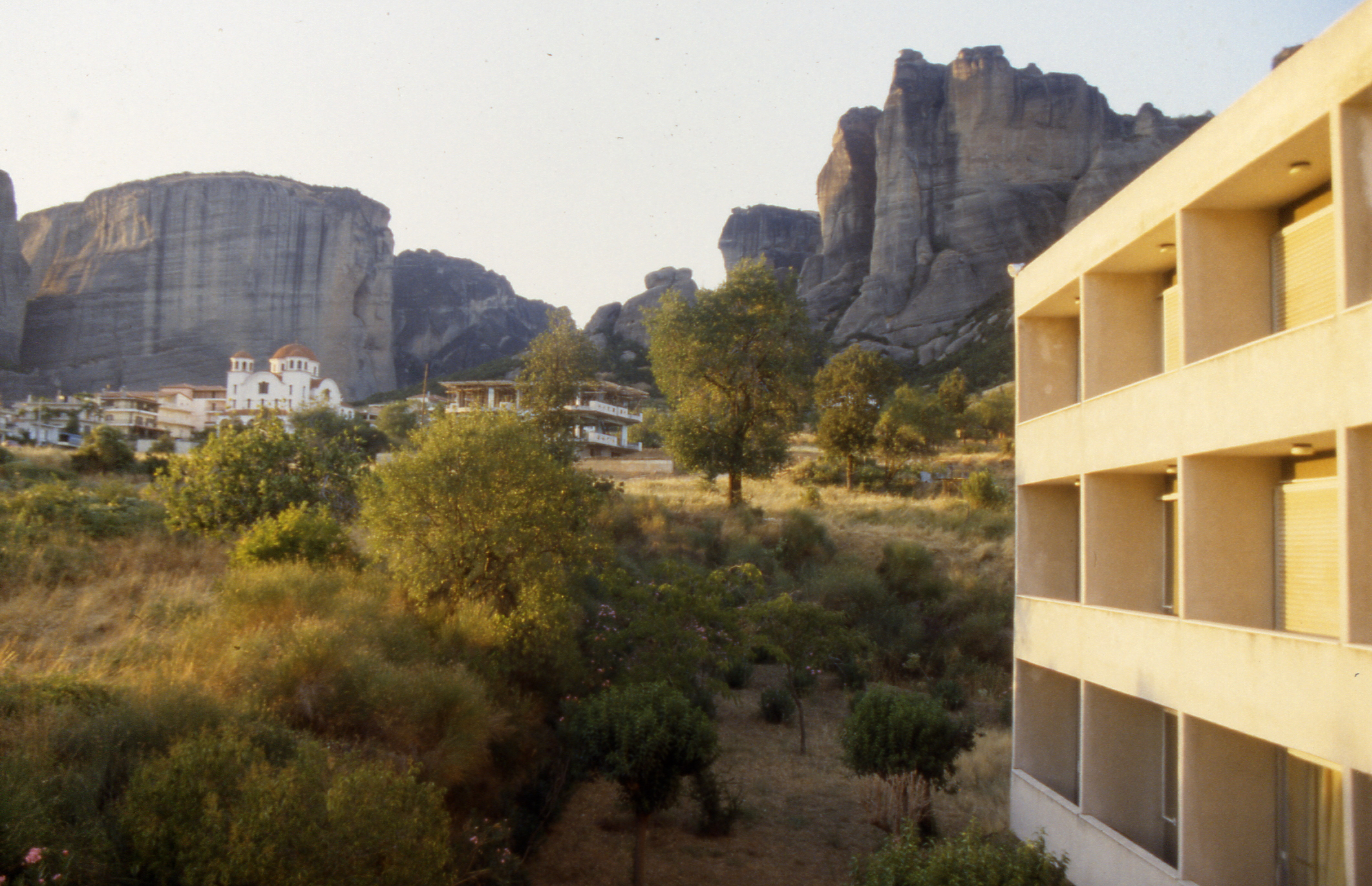 Blick auf Meteora in Kalambaka